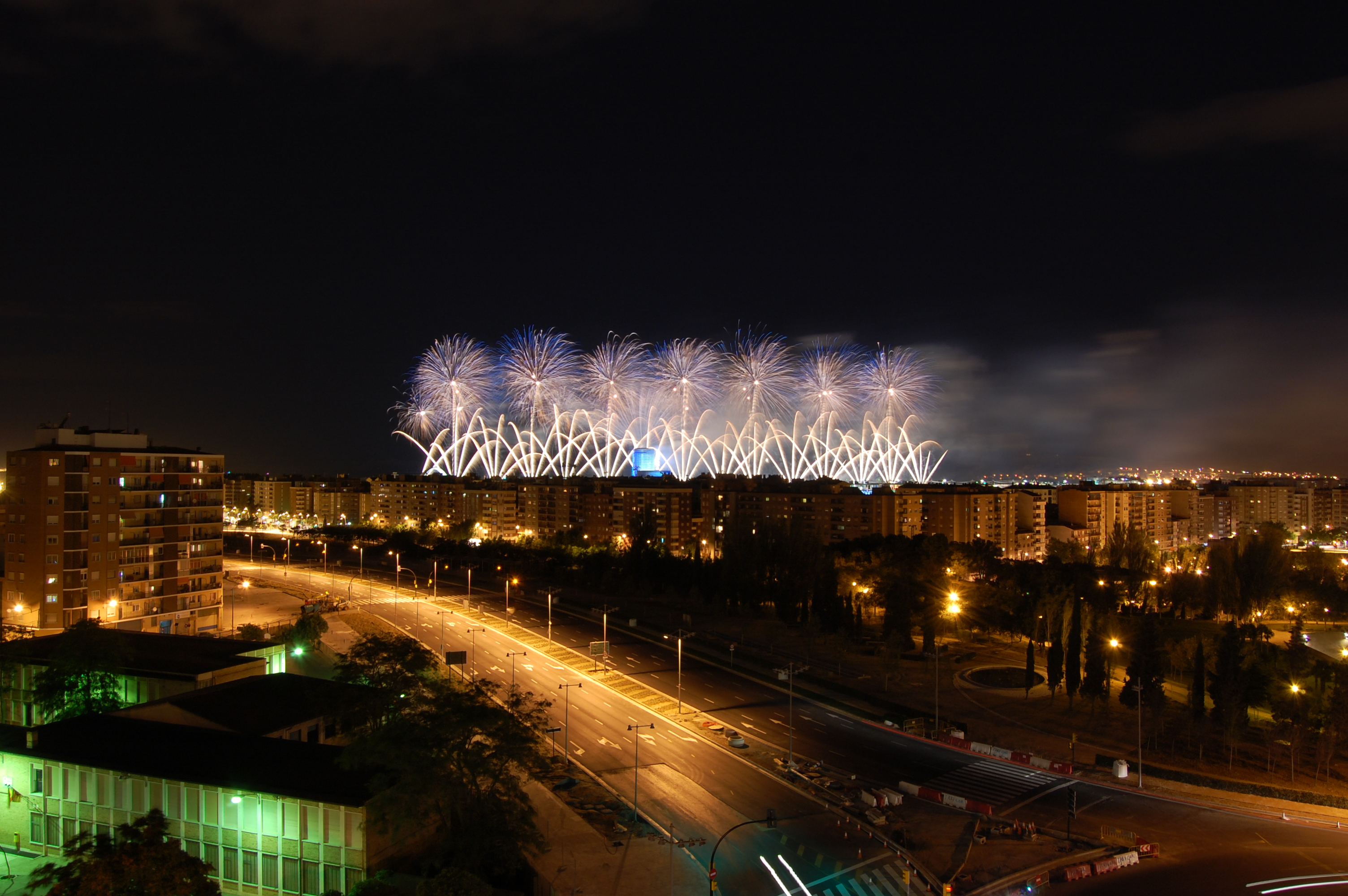 Fuegos artificiales en la Inauguración de la Expo de Zaragoza 2008, España.